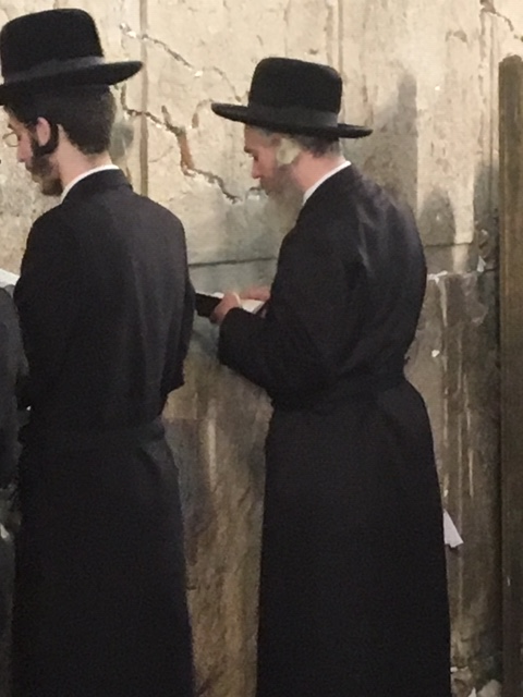 האדמו"ר מלוצק, רבי יוחנן שוחט בתפילה בכותל המערבי